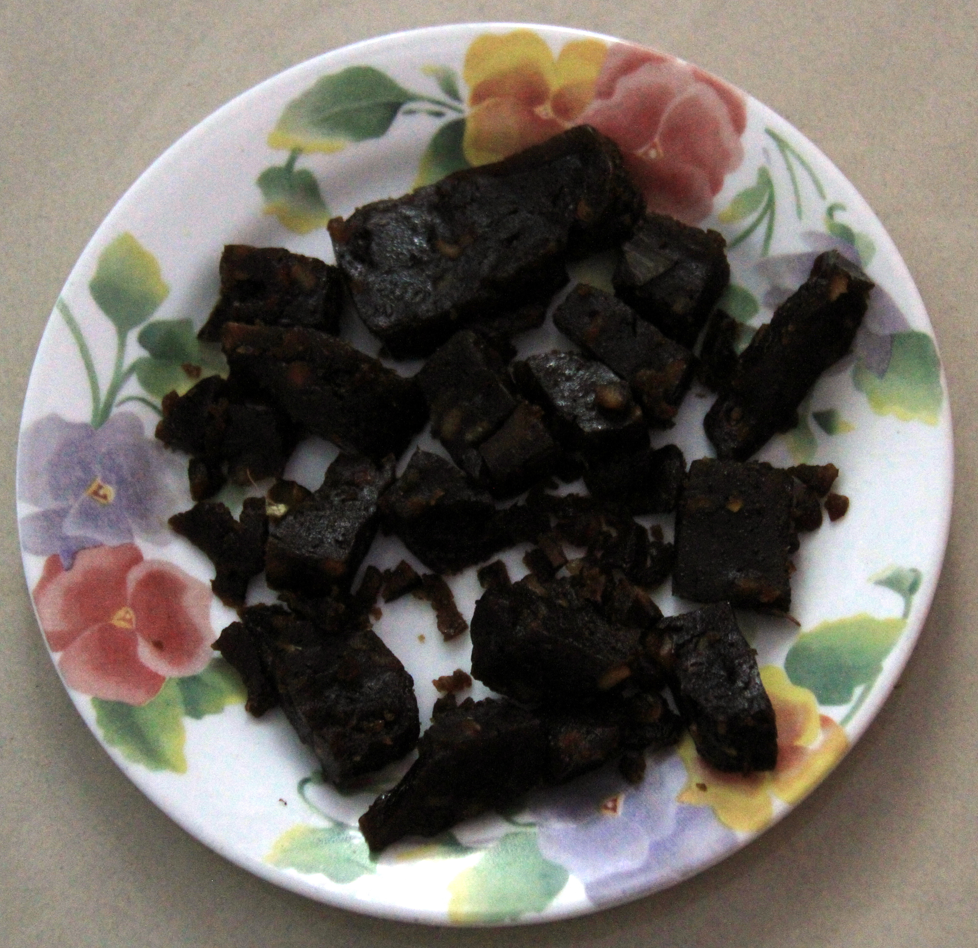 കിണ്ണത്തപ്പം - കഷണങ്ങൾ